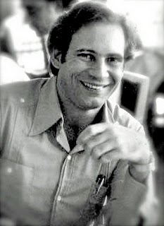 Manuel Pereira a los 32 años de edad.